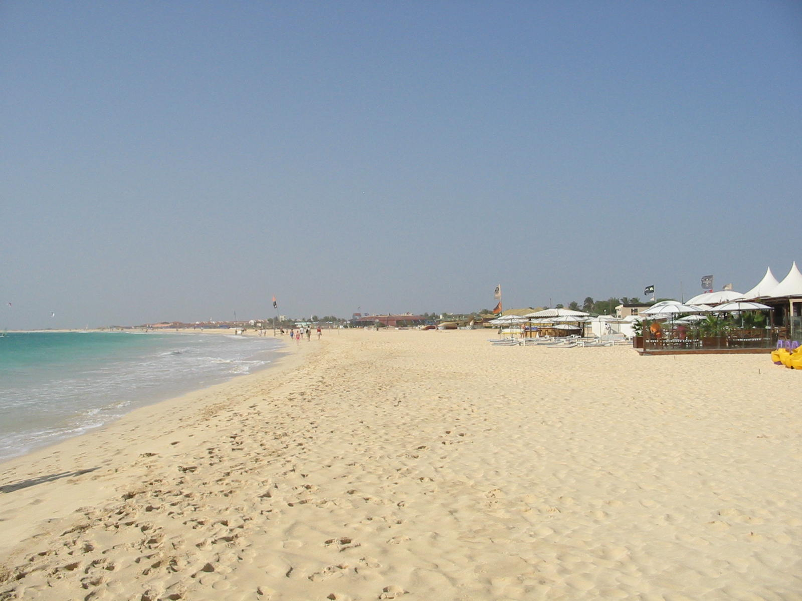 Unnamed Road, Santa Maria, Cape Verde